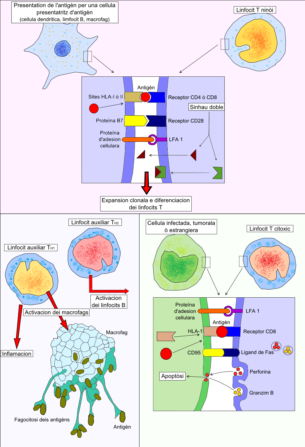 Esquèma generau de l'activacion dei linfocits T dins l'òme.